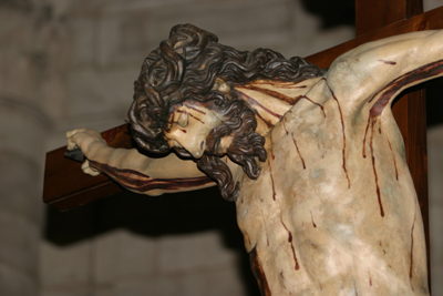 Cristo de la Luz (vulgo "de los Carboneros) Francisco del Rincón. Valladolid